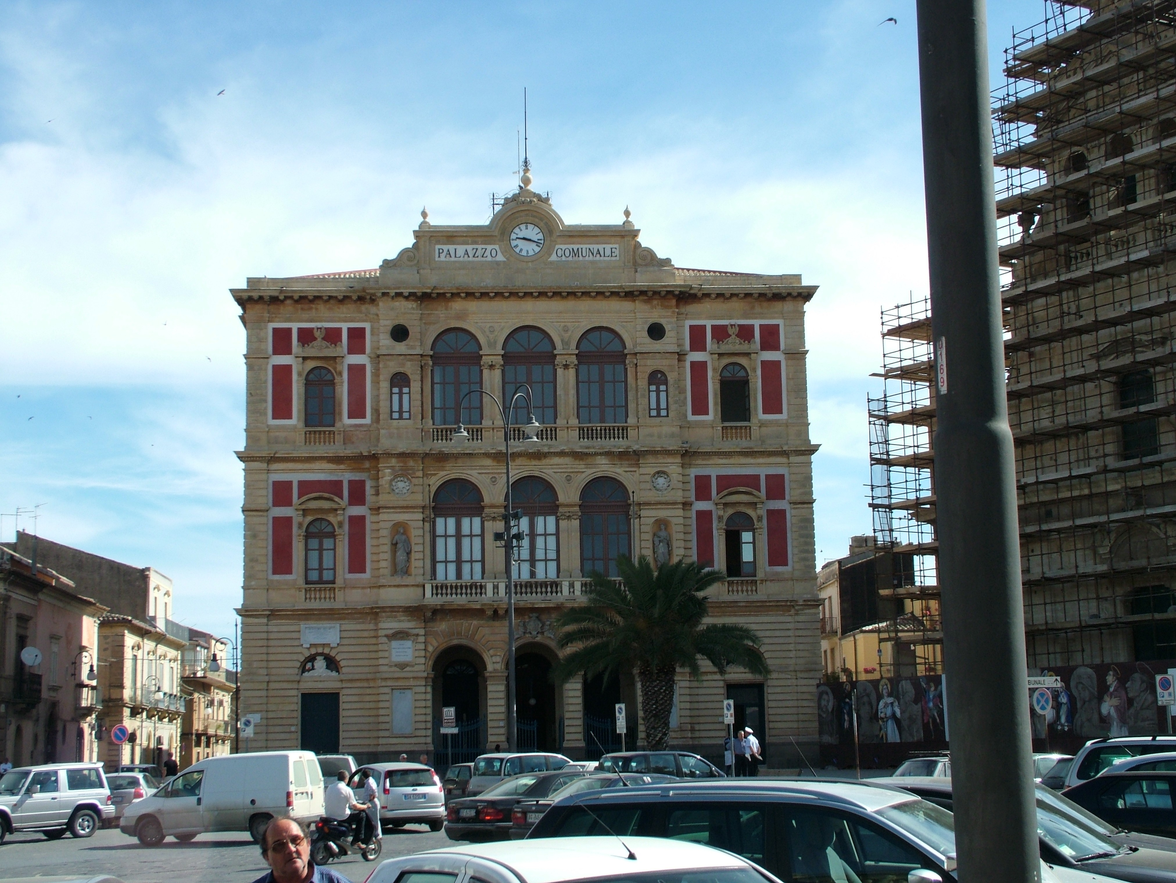 Grammichele, Sizilien, Rathaus